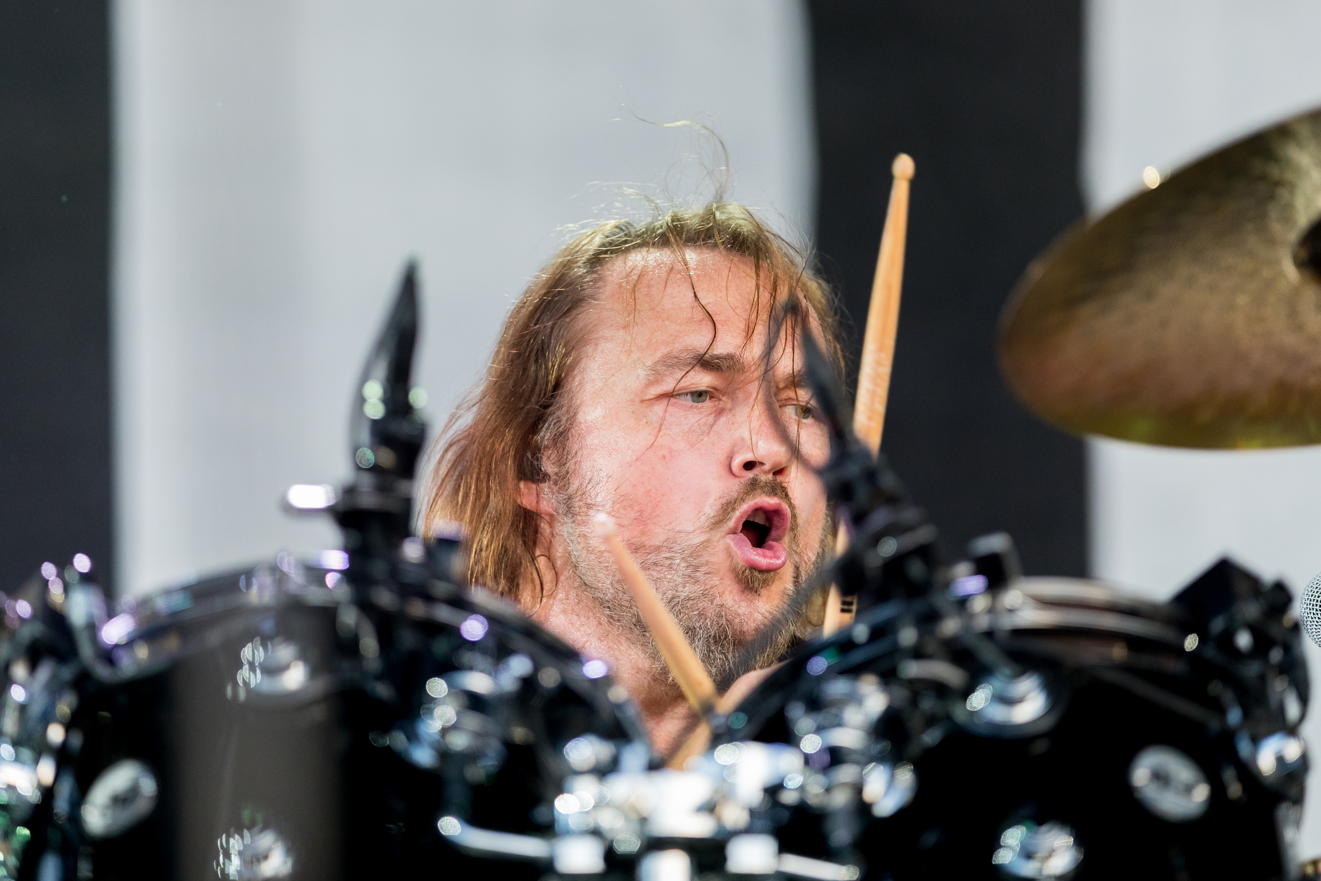 Böhse Onkelz @ Rock the Ring 2018